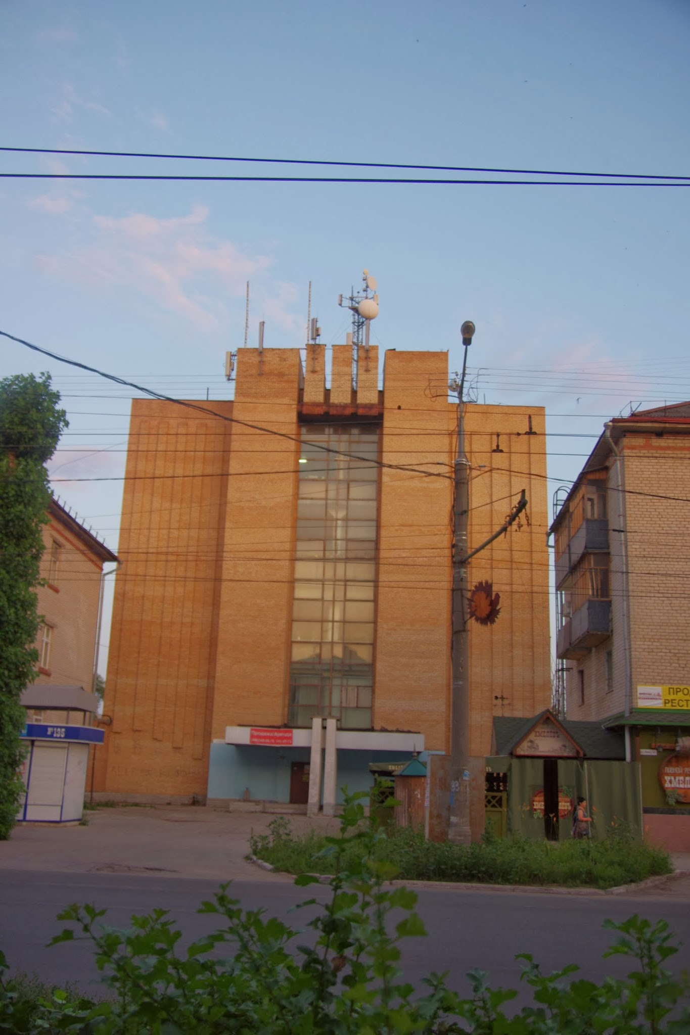 Tsentralnyy rayon, Tolyatti, Samarskaya oblast', Russia